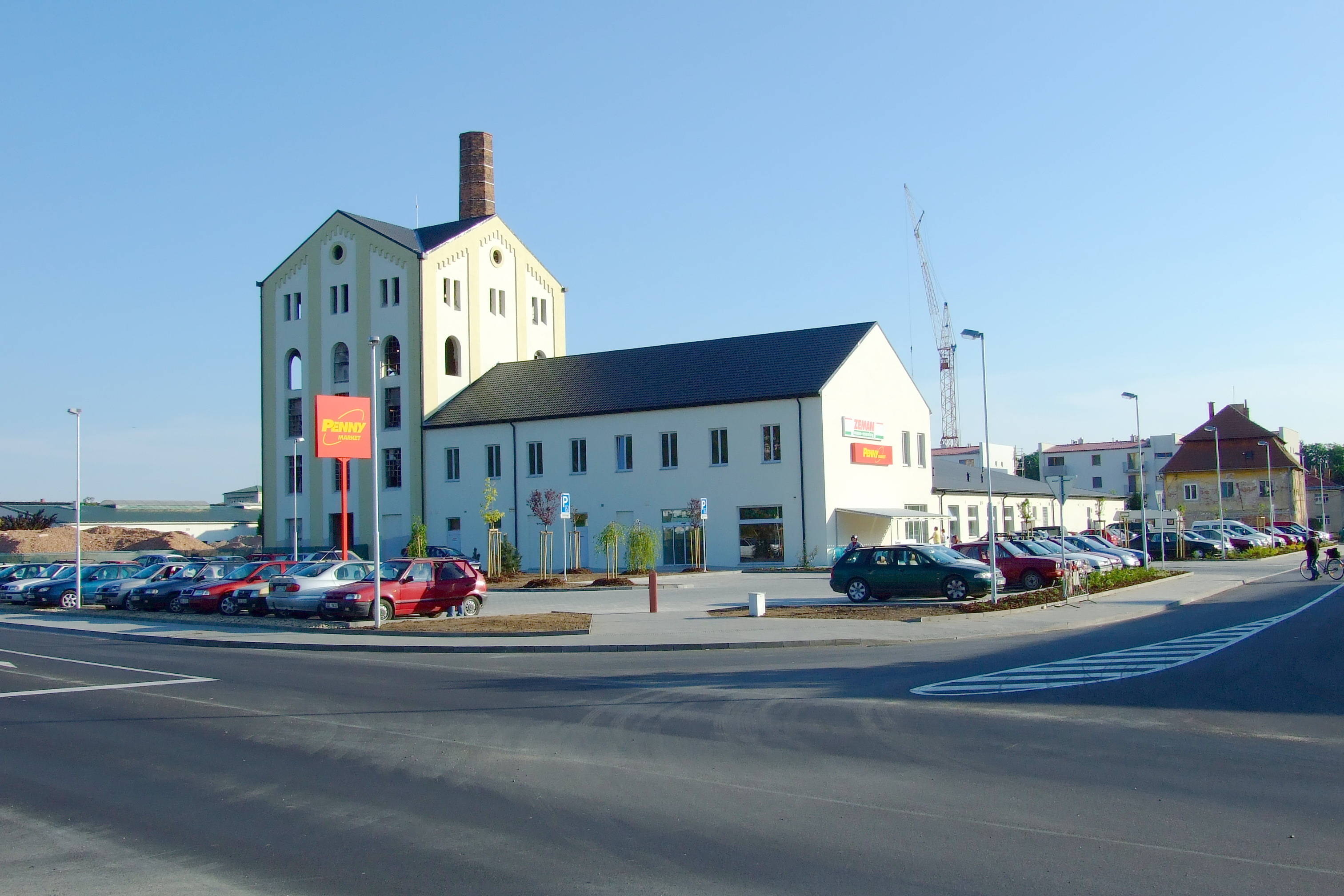 Židlochovice - bývalý cukrovar